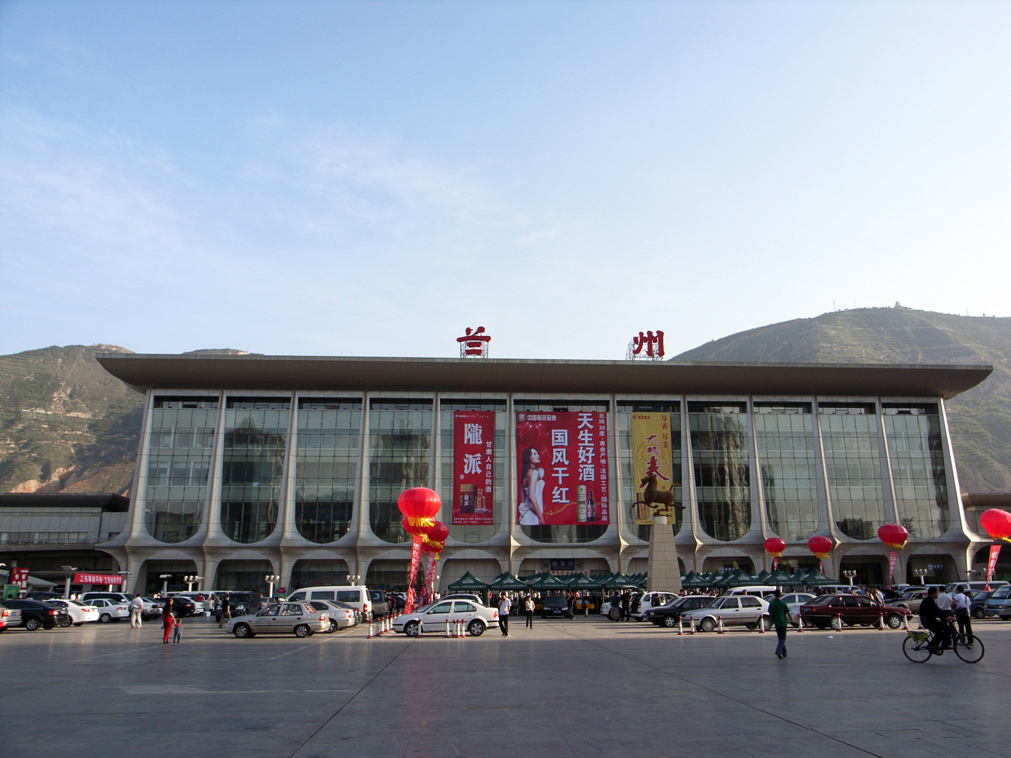 兰州火车站 蘭州車站 Lanzhou station